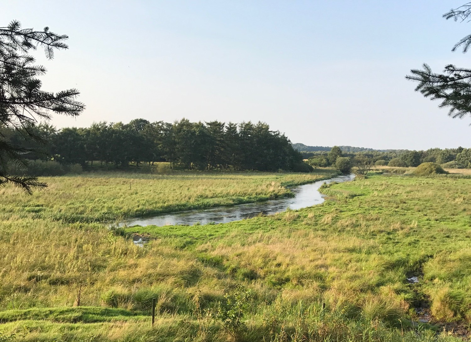 River Kongeå